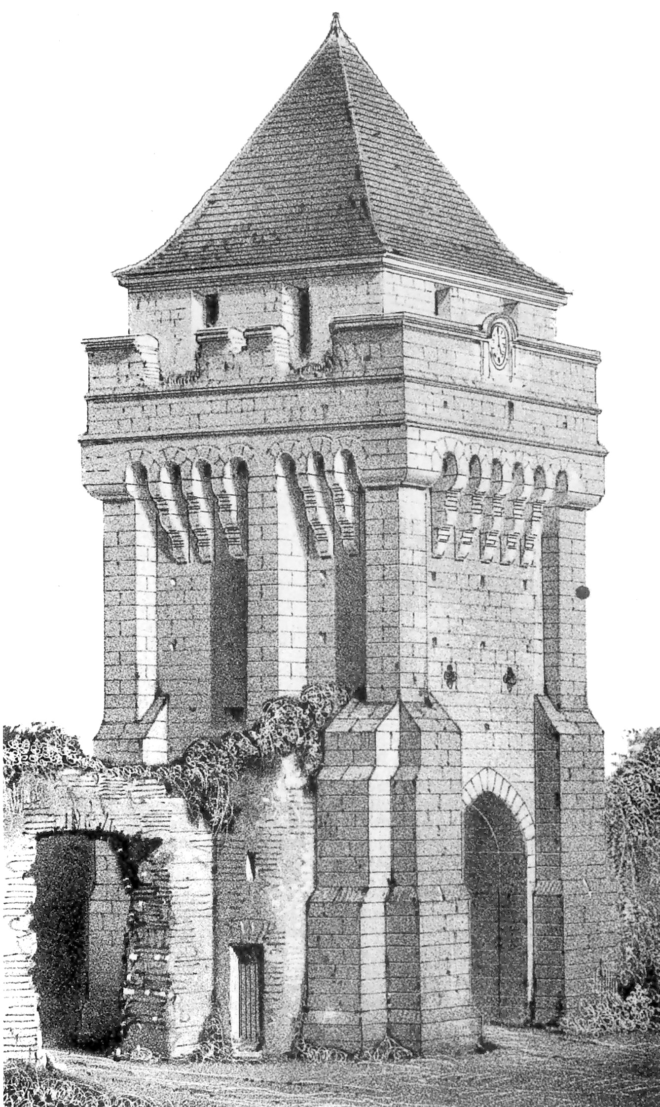 Château de Druyes, Yonne : lithographie de la tour-porche par Victor Petit